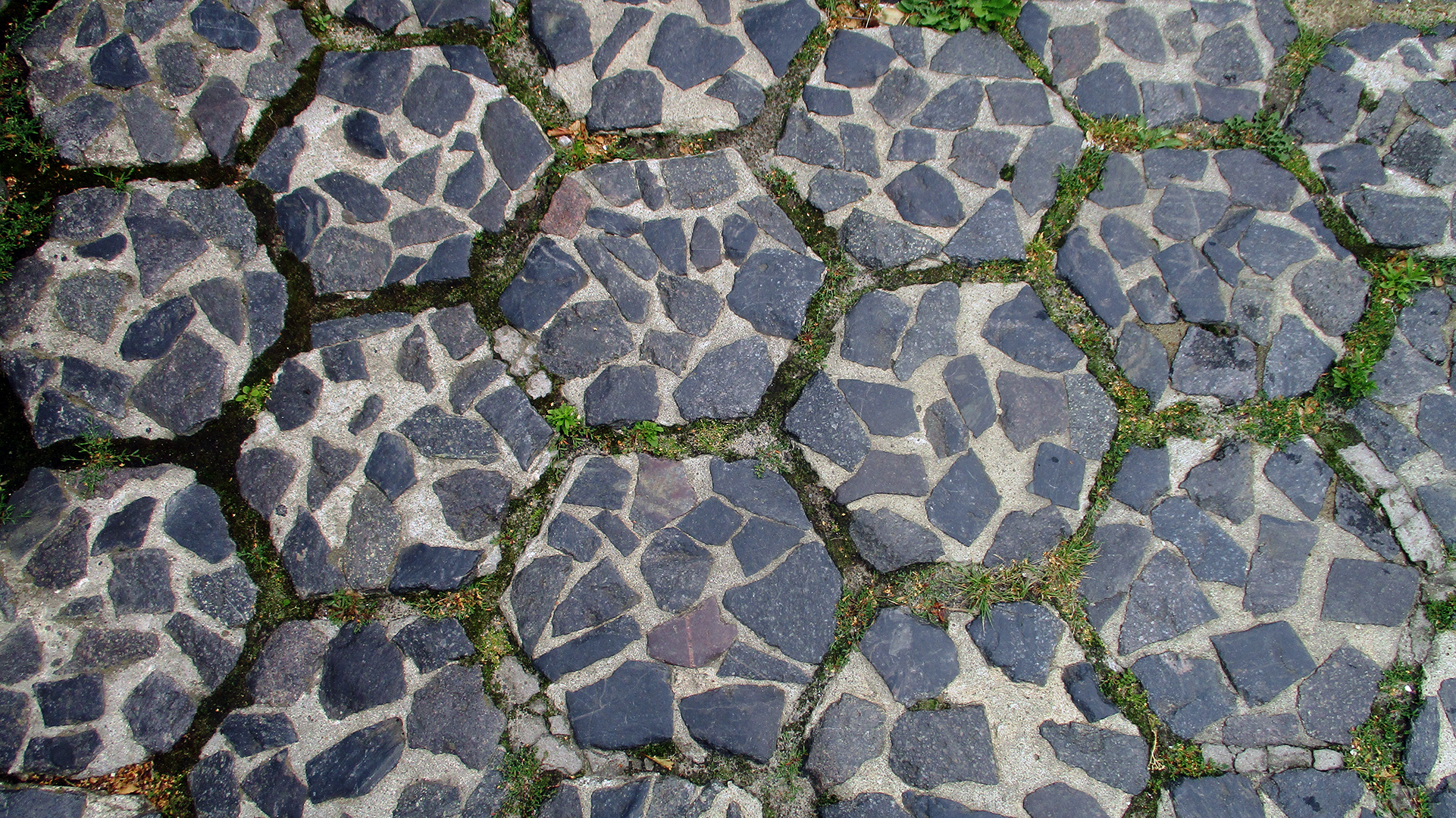 Тротуар з трилінки в Луцьку на вулиці Драгоманова